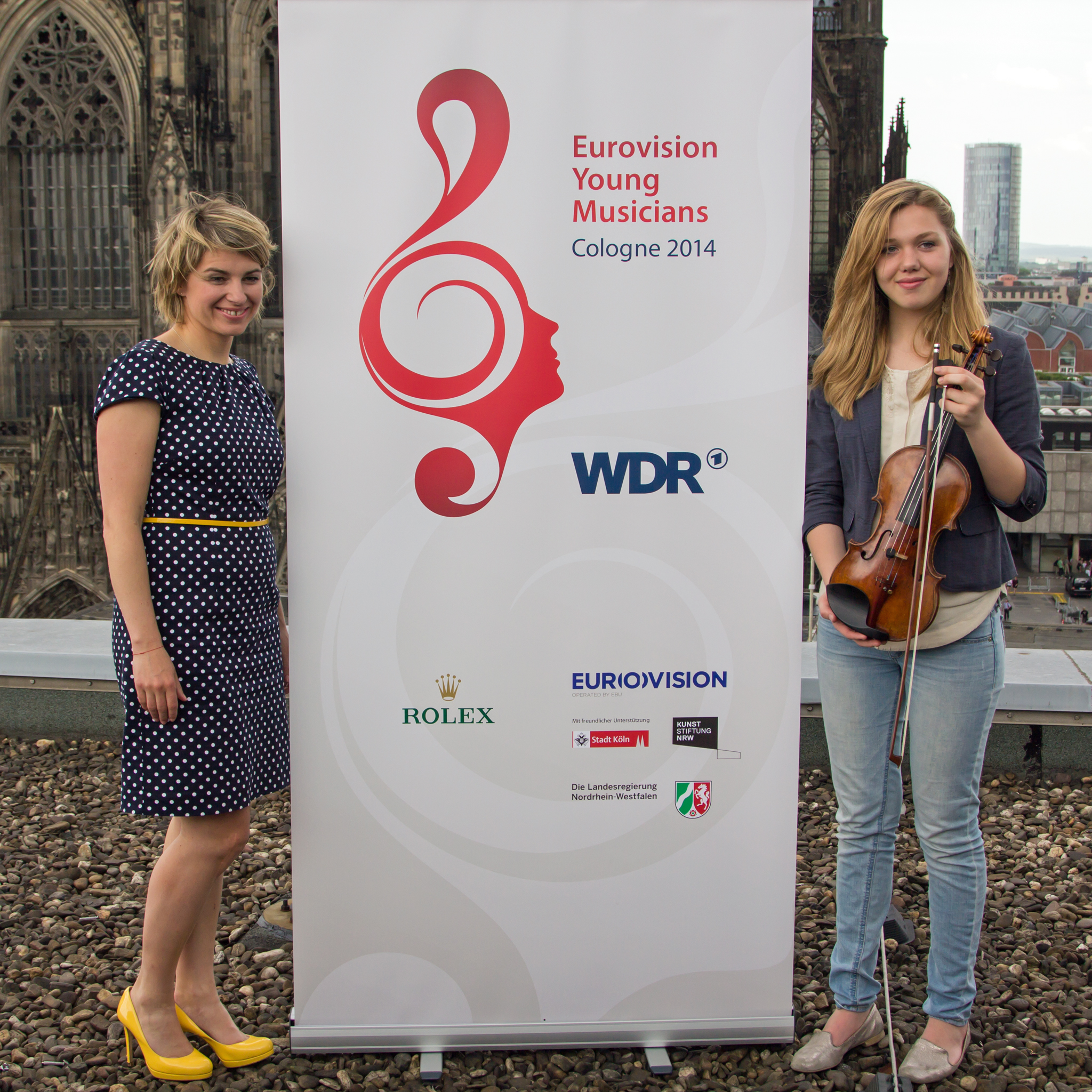 Eurovision Young Musicians 2014, Gruppenfoto auf dem Dach des WDR-Funkhauses mit Sabine Heinrich und Judith Stapf